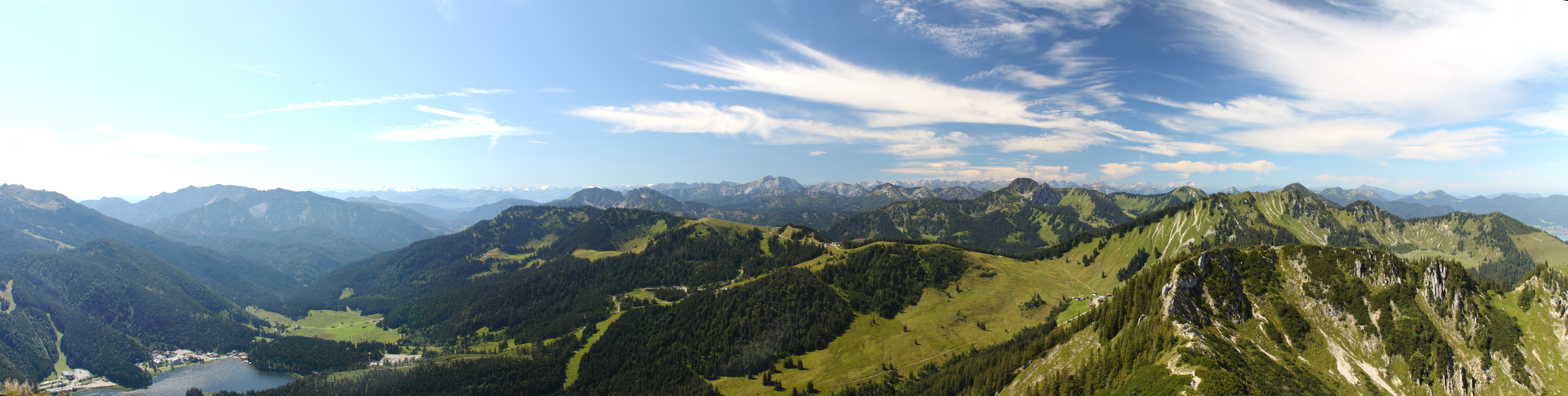 Panorama der Spitzingseeregion vom Brecherspitz mit dem Spitzingsee (links), Stolzenberg (Bildmitte), Stümpfling (rechts der Bildmitte) und Bodenschneid (rechts hinter dem Aufstiegsweg)